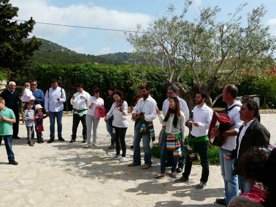 Sales